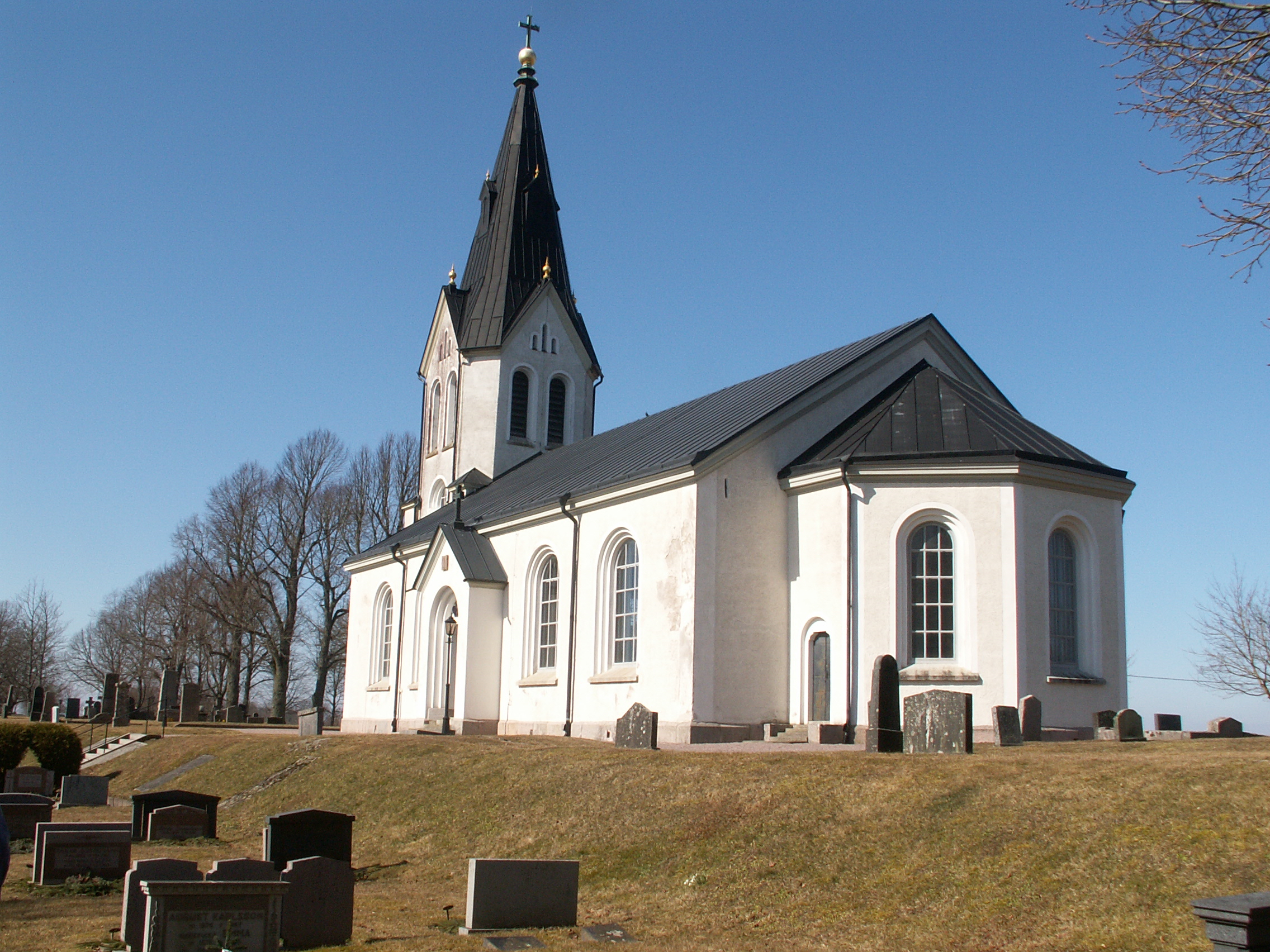 Skånings-Åsaka kyrka